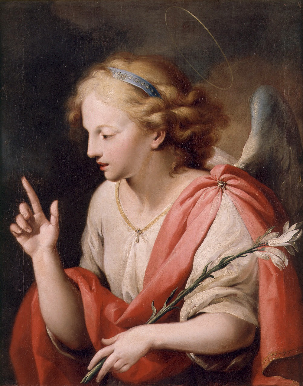 La obra representa al arcángel San Gabriel.